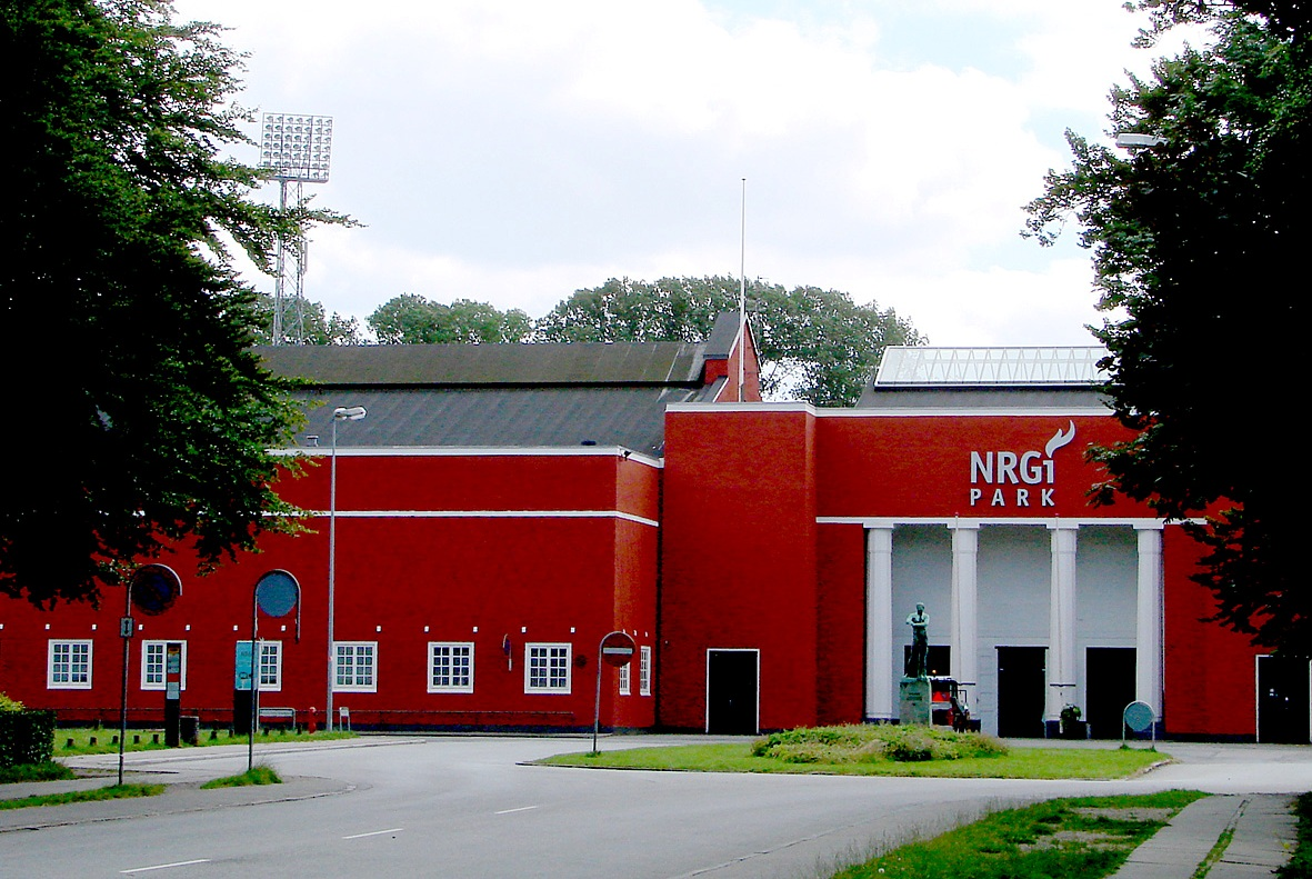 Atletion eller NRGi park i Århus tidligere Århus Idrætspark.